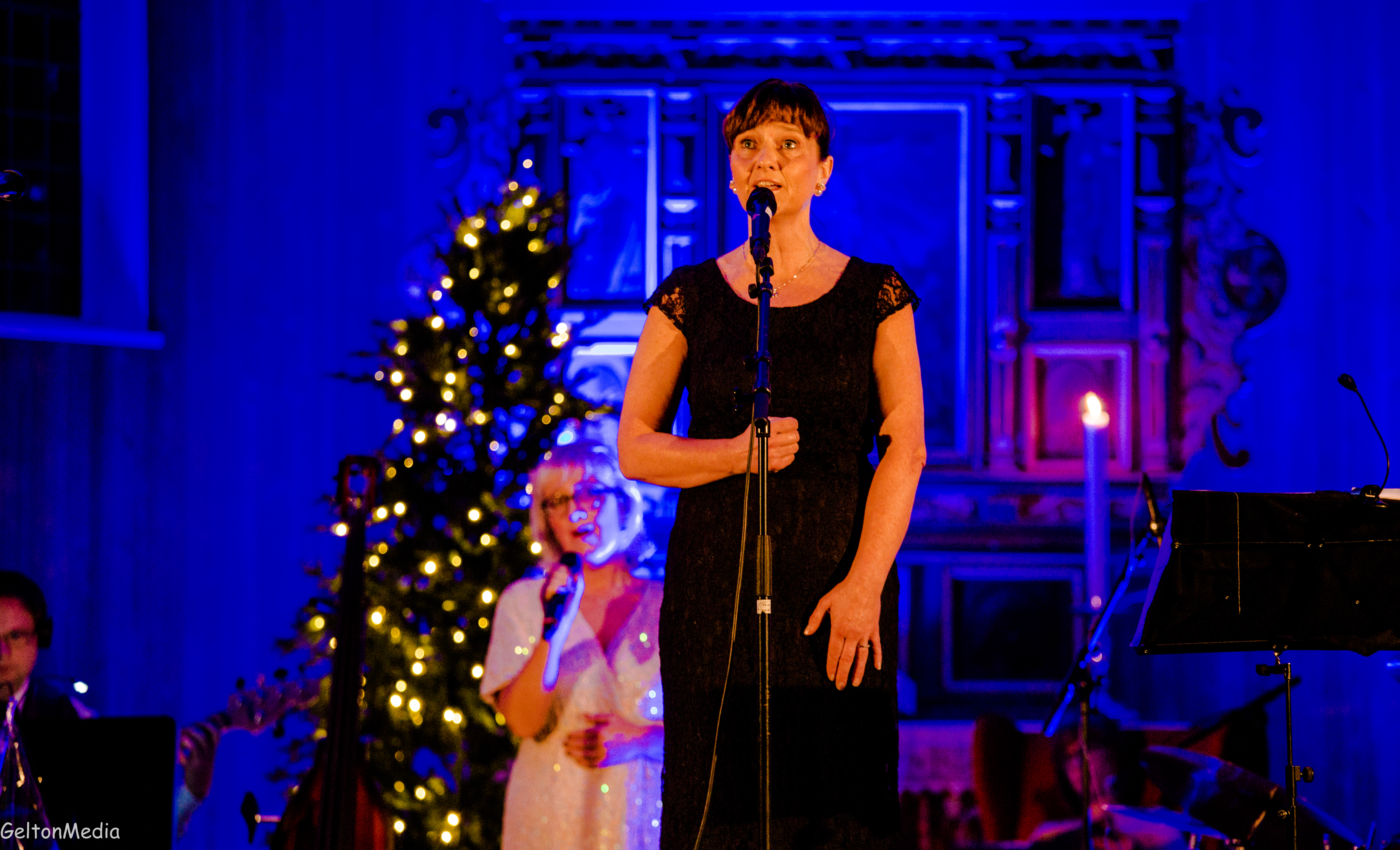 Helga Paulsen